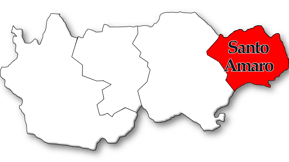 População